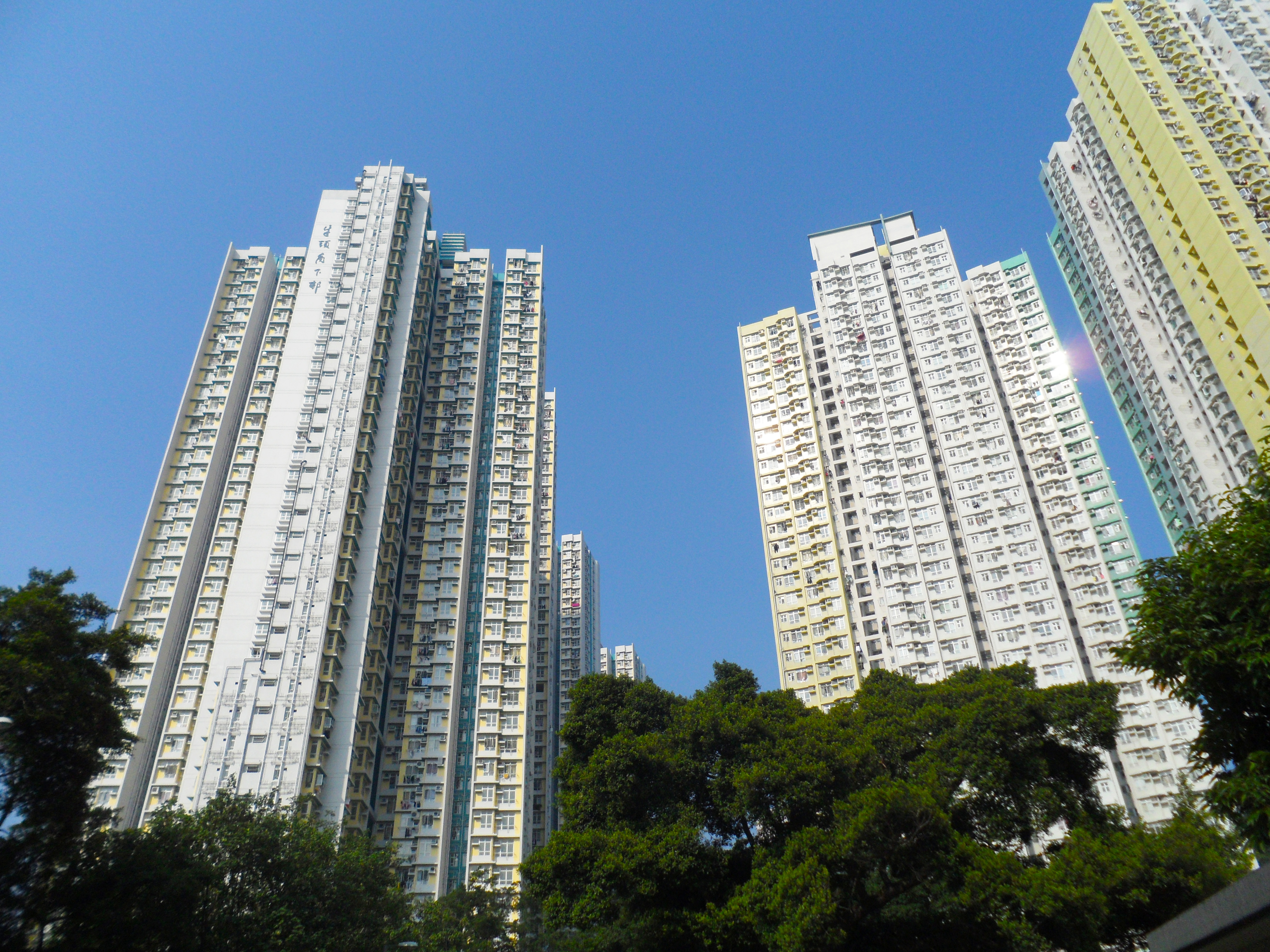 牛頭角下邨與牛頭角上邨外貌